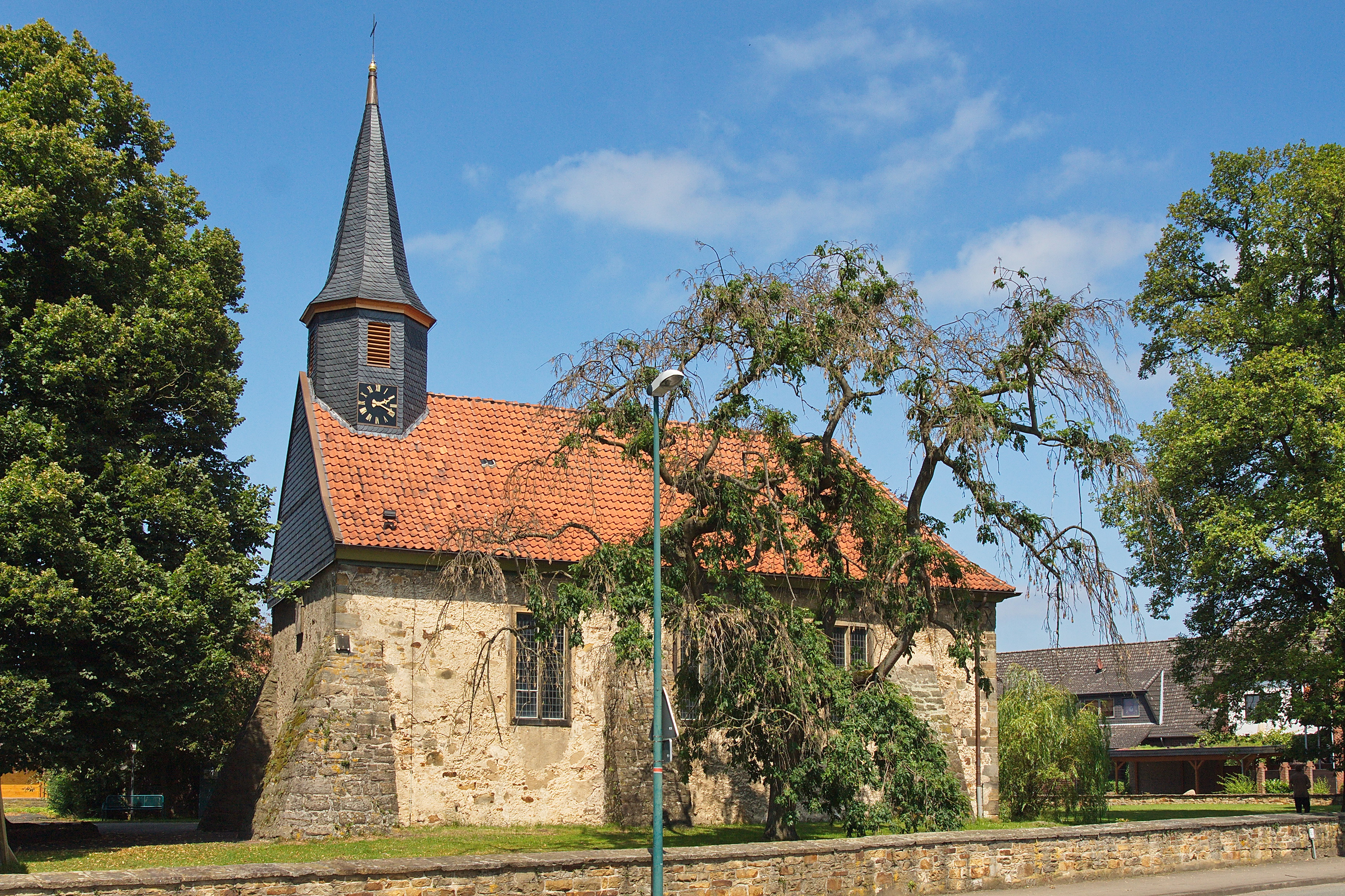 Kirche in Münchehagen (Rehburg-Loccum)), Niedersachsen, Deutschland